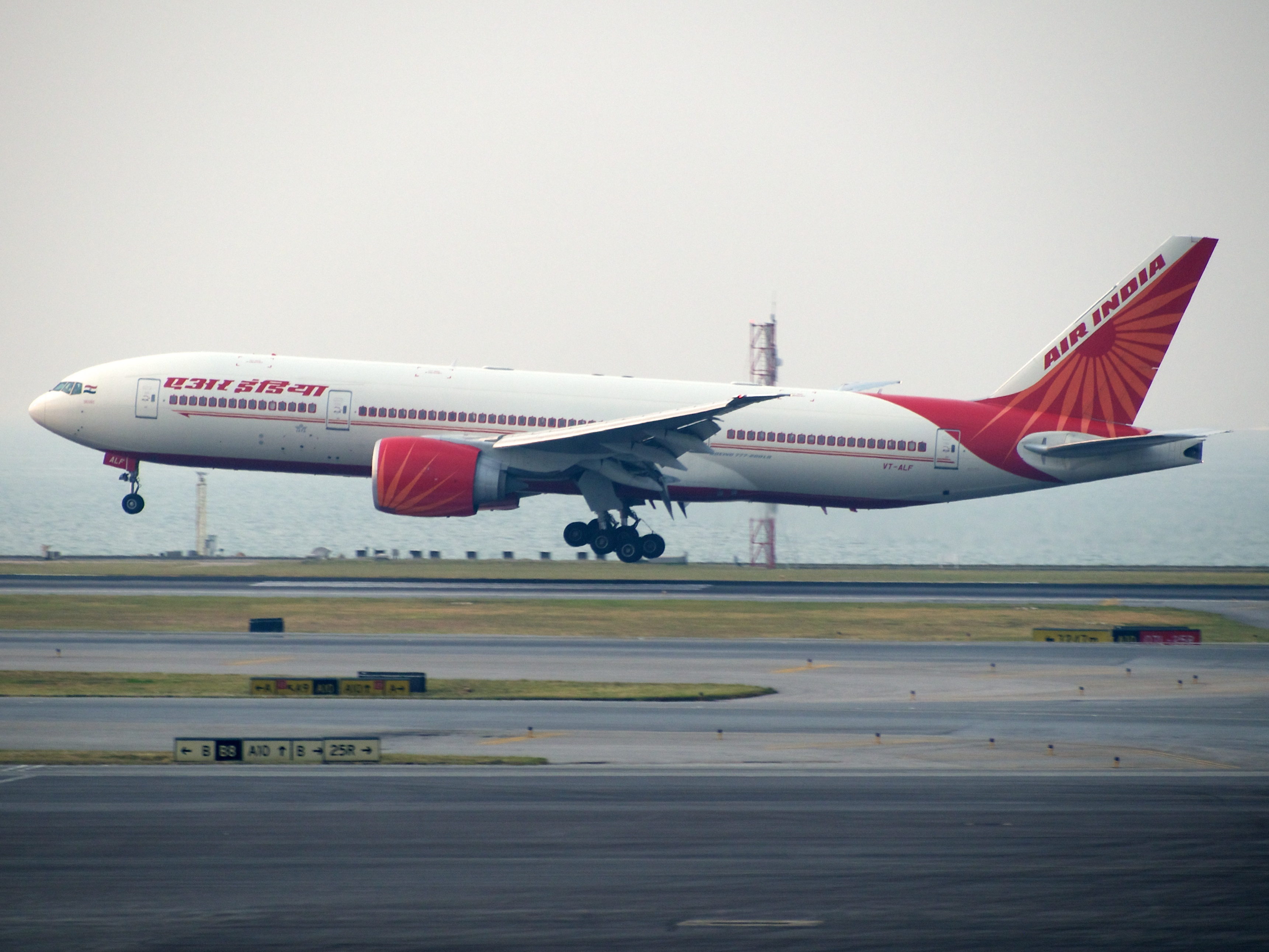 VT-ALF | 777-237 LR | Air India | Hong Kong